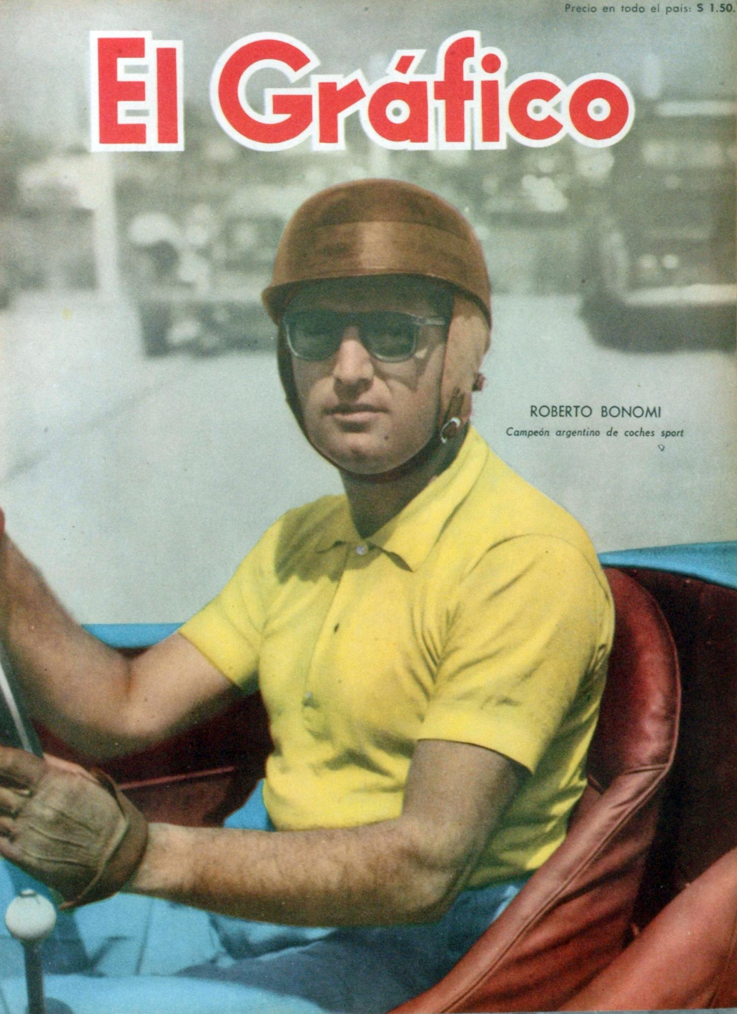 El Grafico del 27 de Febrero de 1953. Edicion 1751